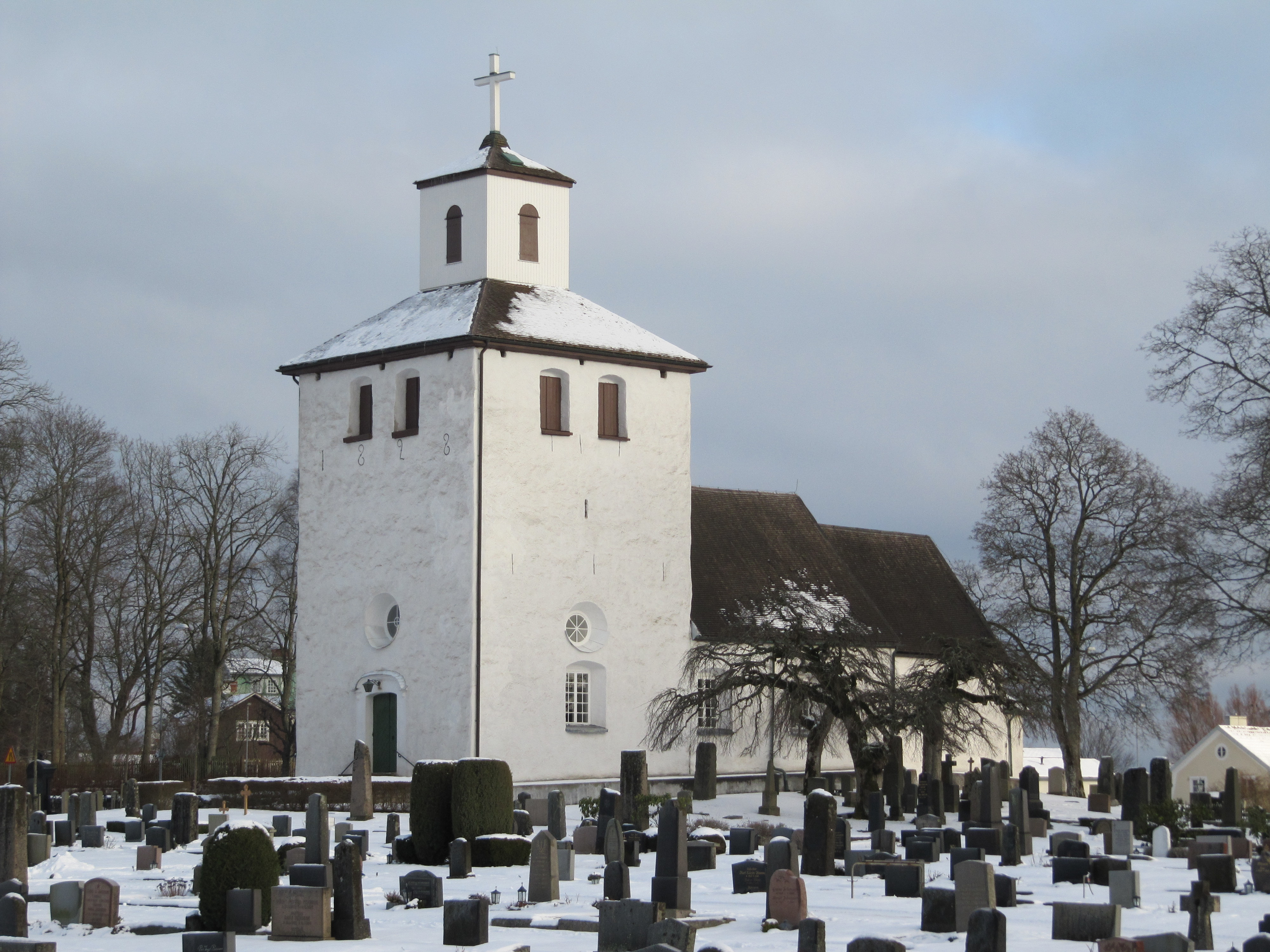 Vittsjö kyrka